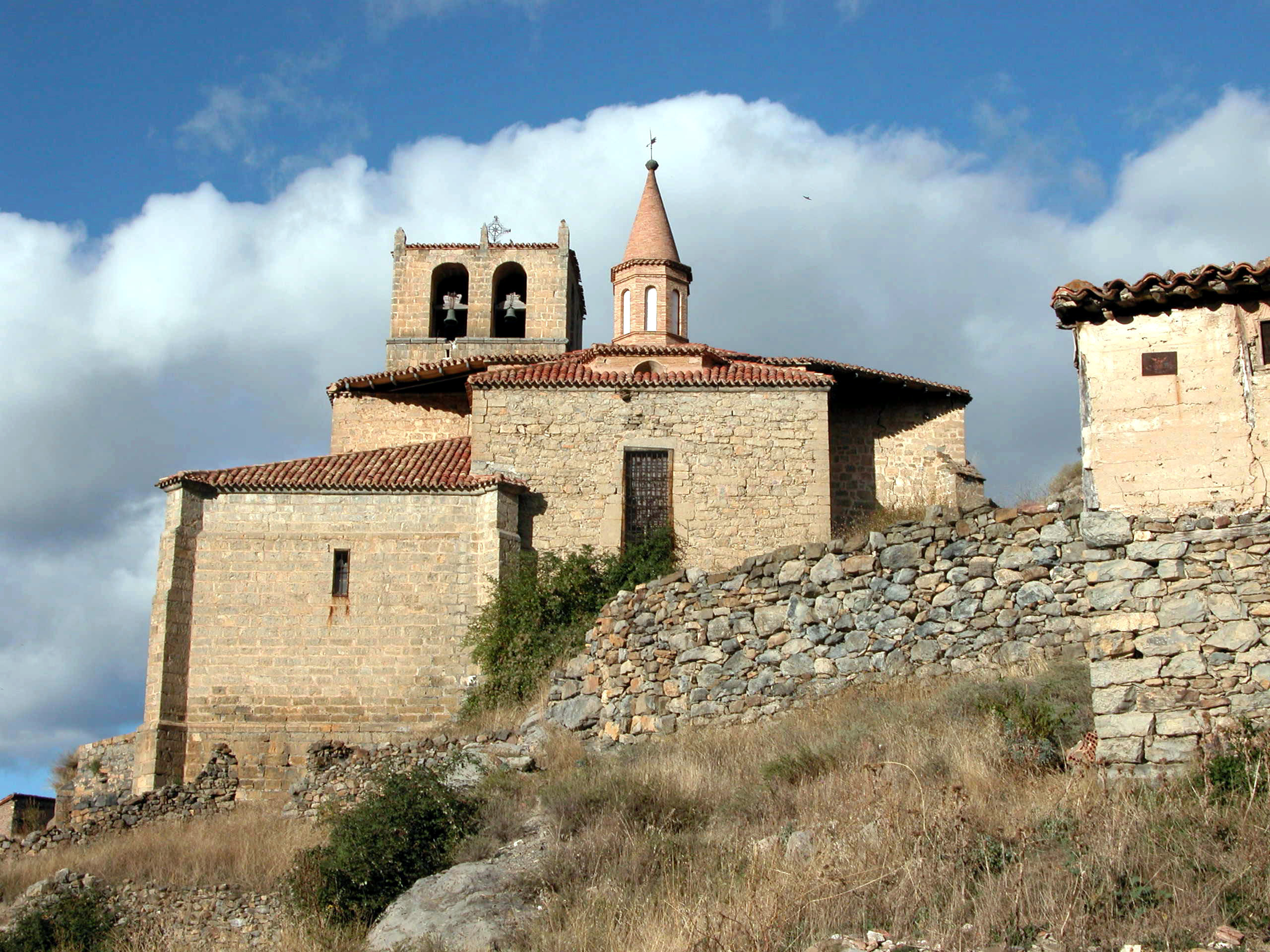 Iglesia de Santa María de la Estrella, Enciso - La Rioja - España.